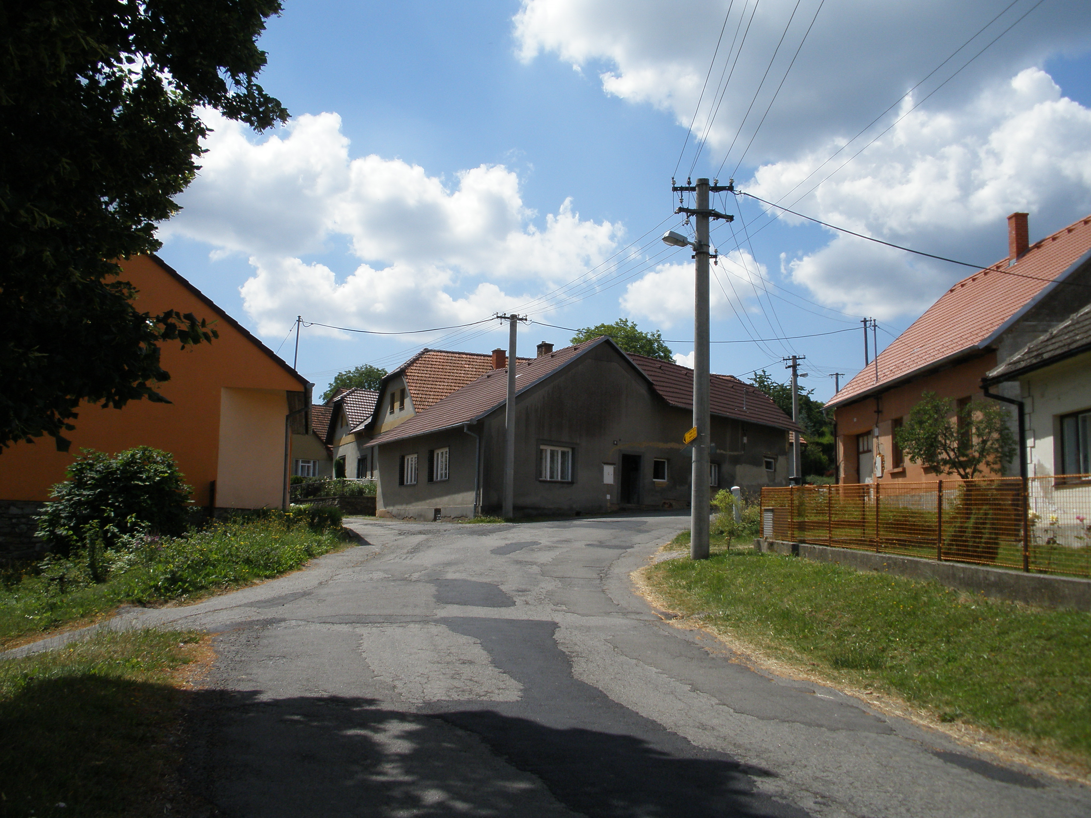 Tasovice, ulice u kaple